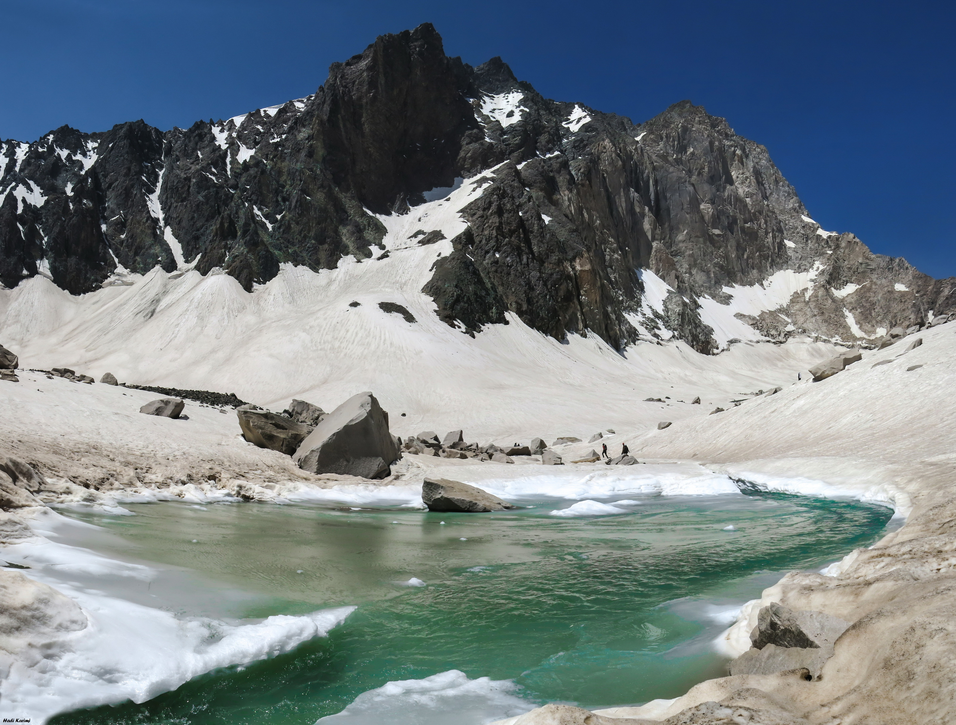 دریاچه یخچالی در پای دیواره علم‌کوه